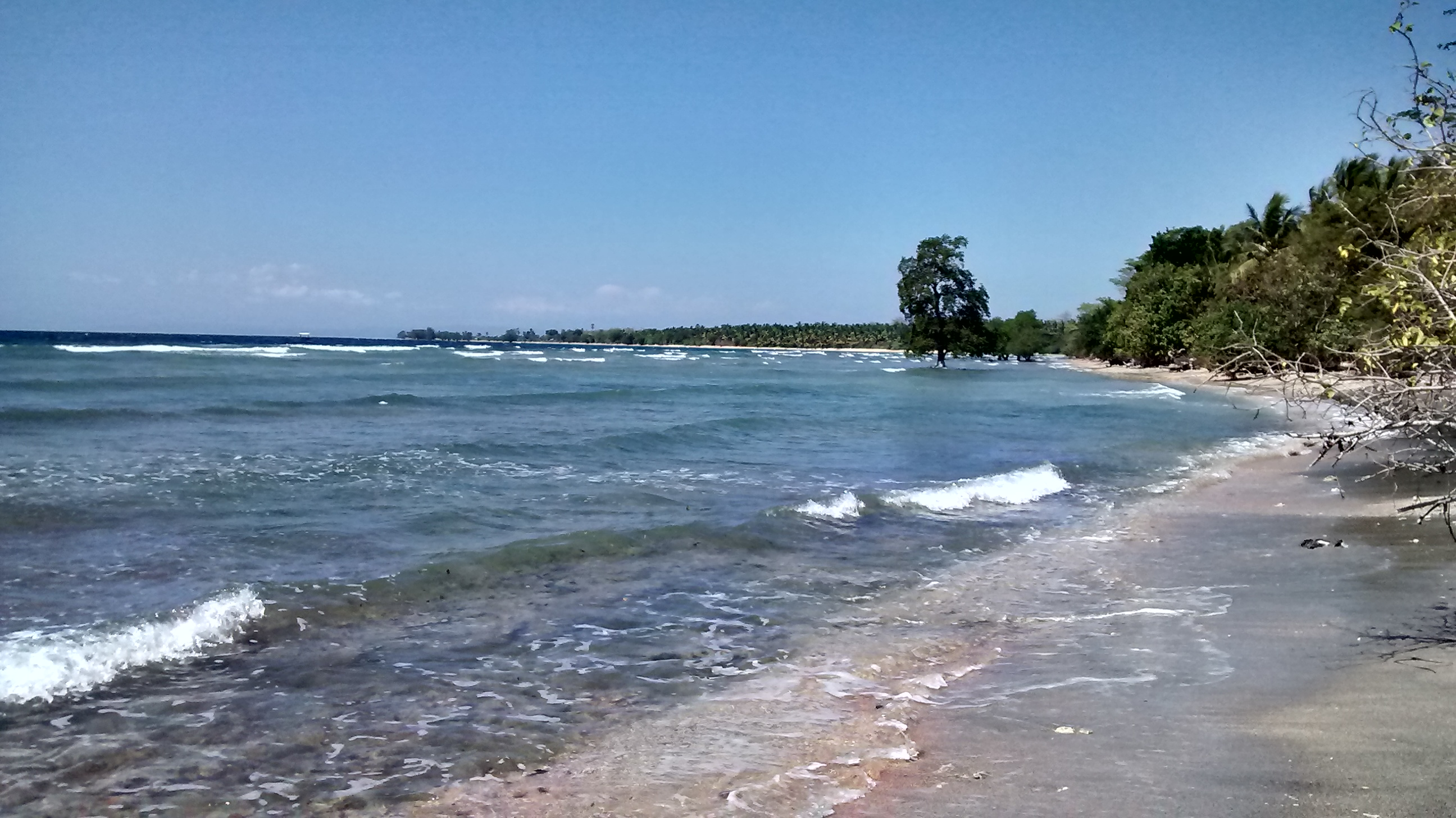 Rhee Loka, Rhee, Sumbawa Regency, West Nusa Tenggara, Indonesia